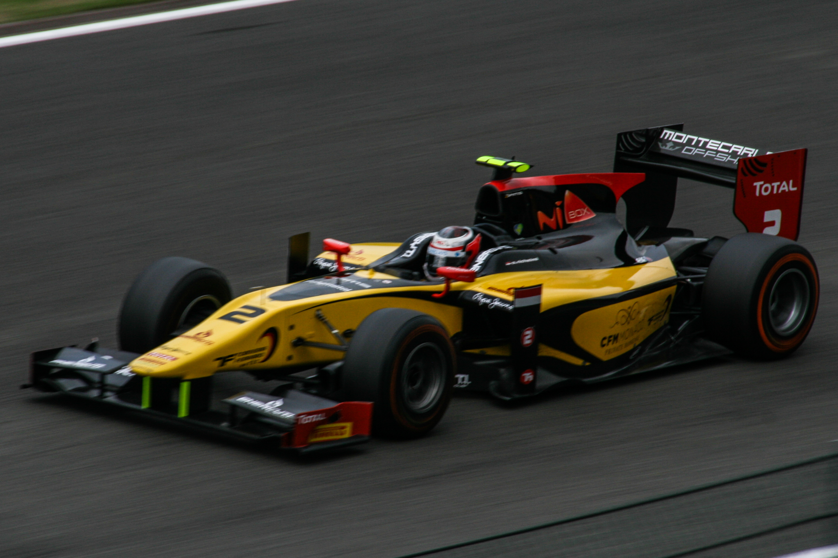 Stéphane Richelmi beim Sprintrennen der GP2-Serie in Spa-Francorchamps 2013